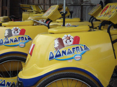 Carretillas D'onofrio